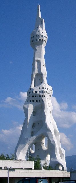 パーフェクト・リバティー教団の大平和祈念塔（通称「PLの塔」または「PLタワー」） 撮影者KENPEI ,撮影日2004年10月10日 (日)